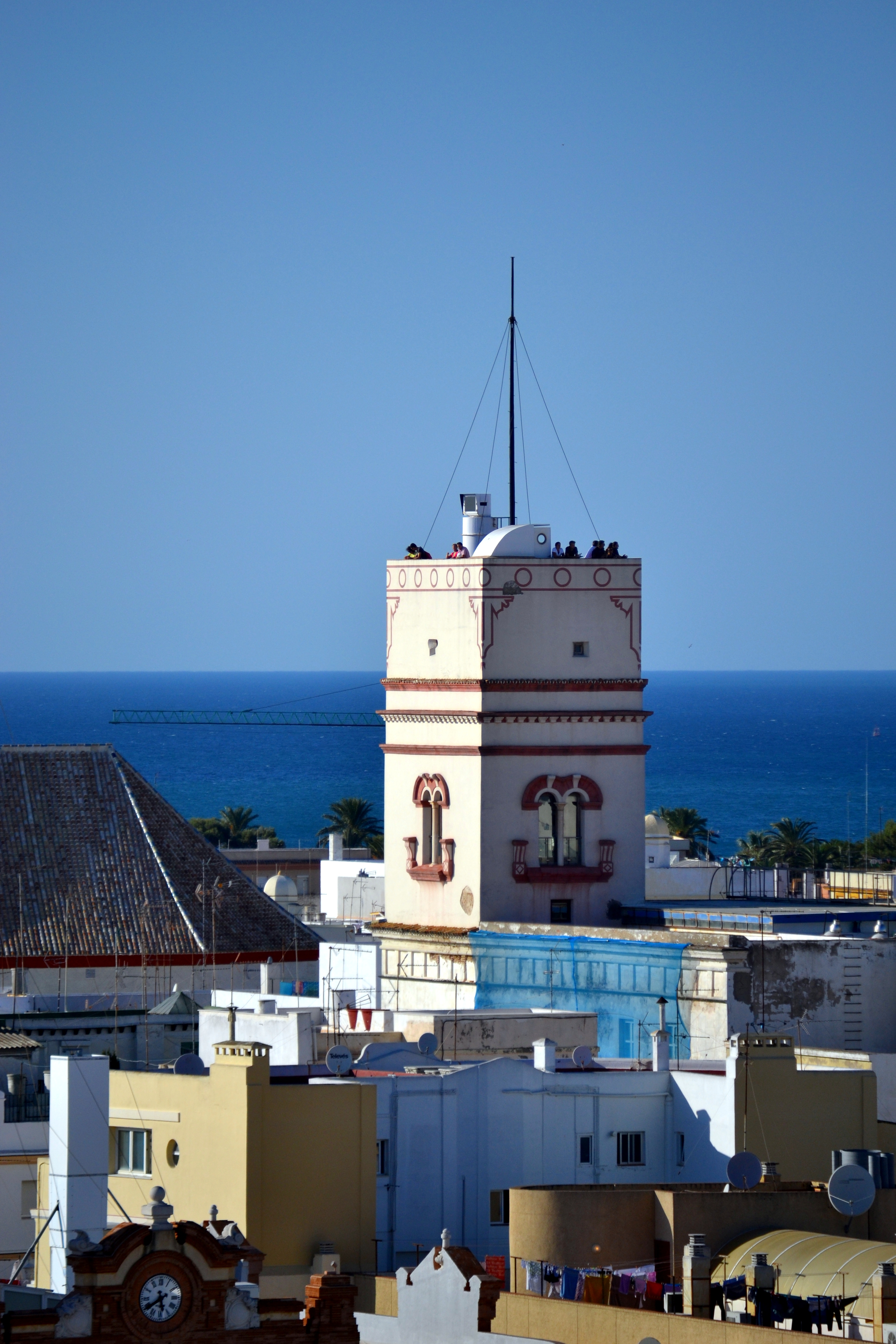 Vistas desde la Torre de Poniente de la Catedral de Cádiz, España.